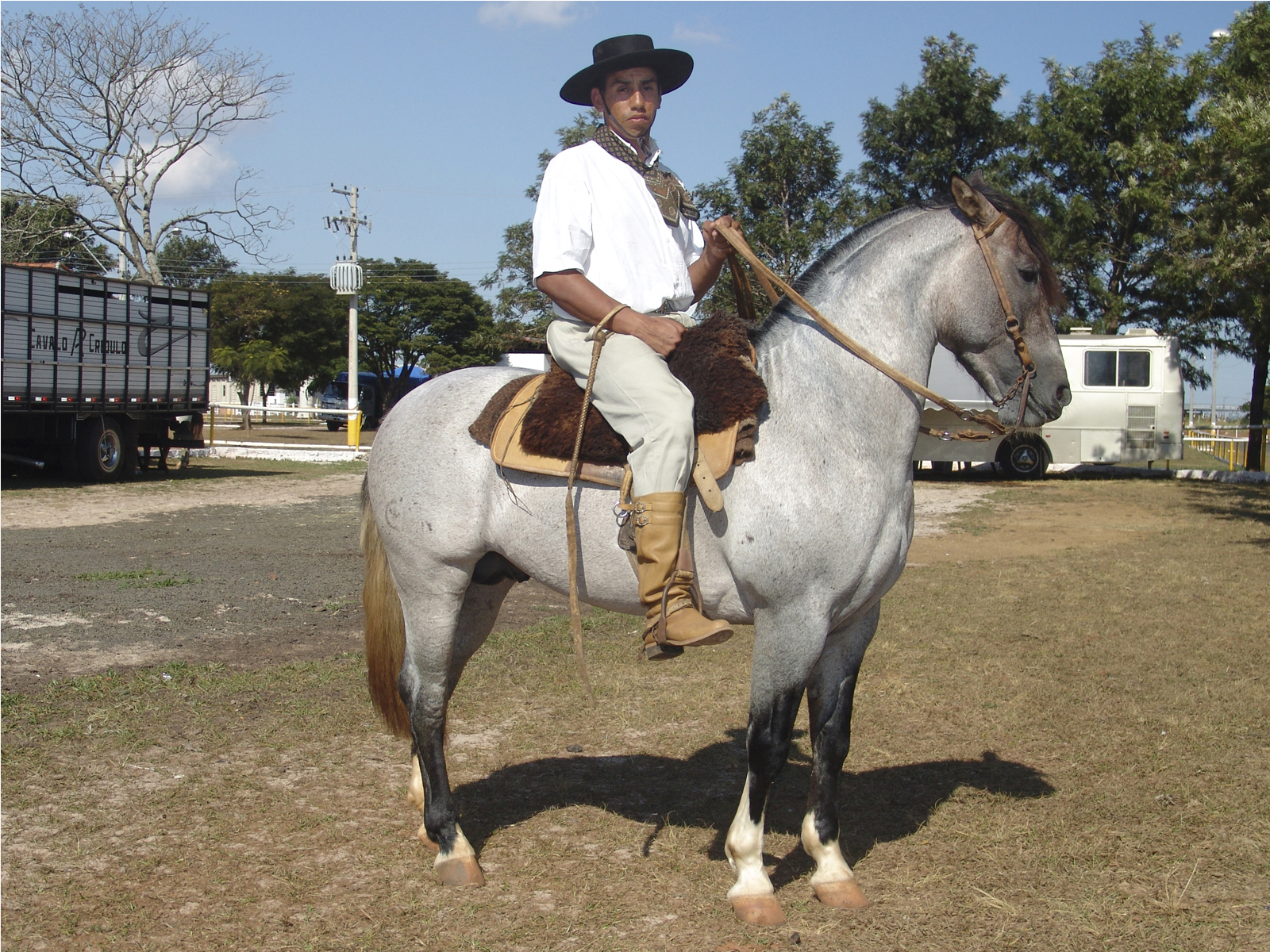 Cavalo da raça Crioulo e cavaleiro típico,Avaré, Brasil